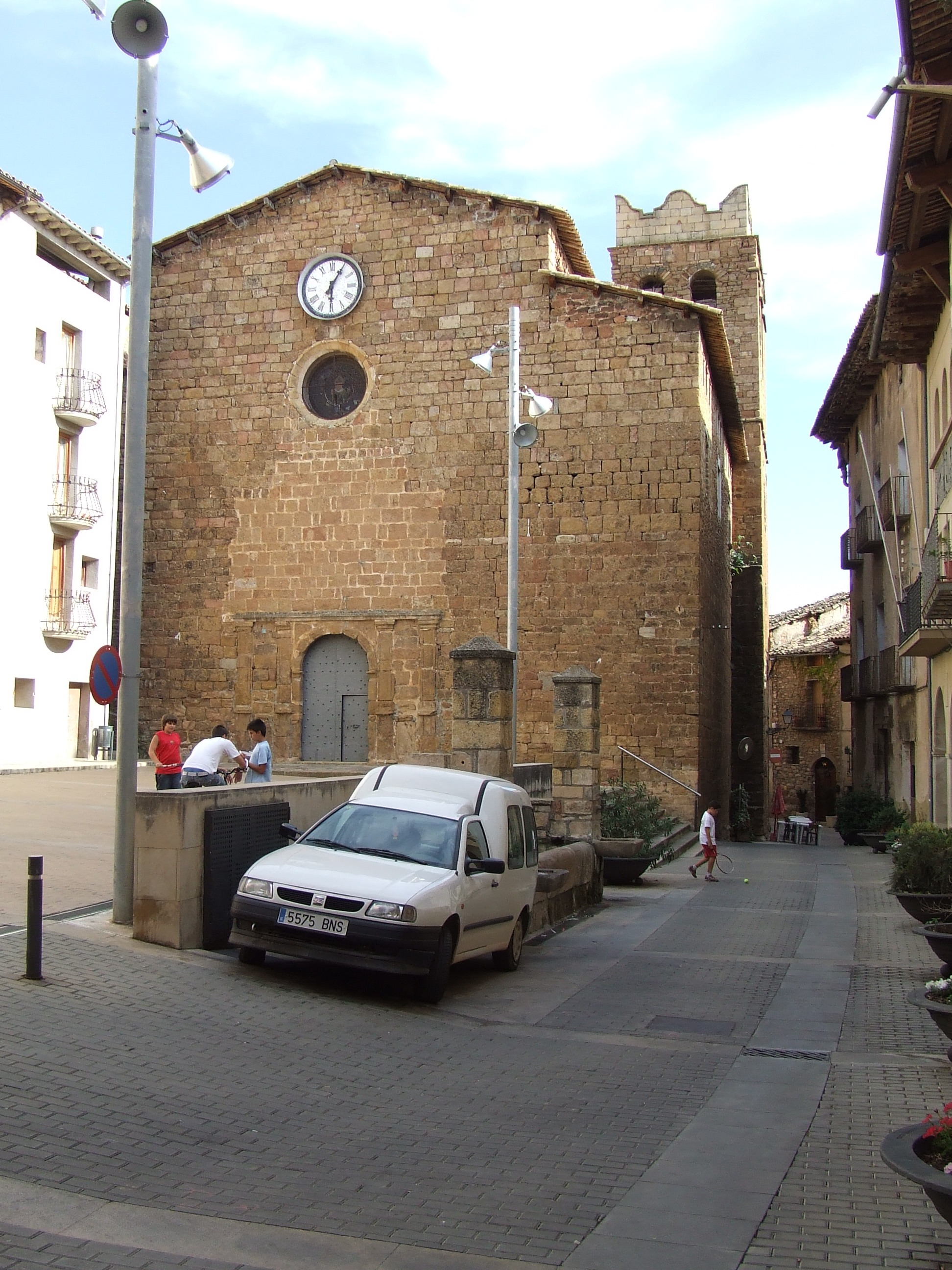 Façana de ponent de Sant Martí de Talarn (Pallars Jussà)